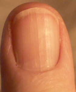 lekuk menegak pada kuku